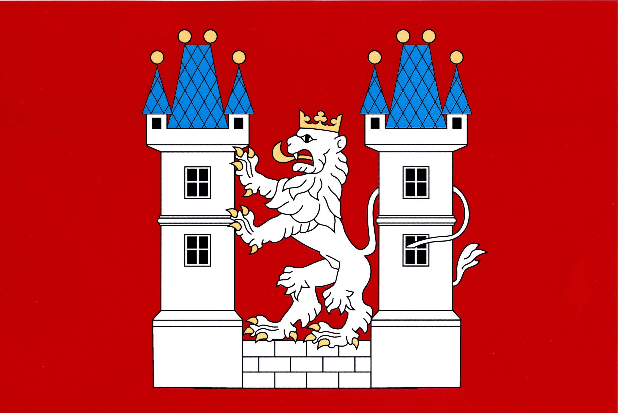 Vlajka města Velvar: V červeném štítě dvě stříbrné věže. Každá má rozšířený sokl, římsou oddělené patro, dvě černá okna nad sebou, rozšířený ochoz, valbovou střechu zakončenou dvěma makovicemi a na ochoze dvě nárožní věžičky, každá s černým oknem a stanovou střechou zakončenou makovicí, střechy modré, makovice zlaté. Mezi věžemi nízká stříbrná kvádrová zeď, na ní stříbrný korunovaný lev se zlatou zbrojí opírající se o pravou věž. Lví ocas ovíjí zezadu levou věž a jeho konec je prostrčen dolním oknem.